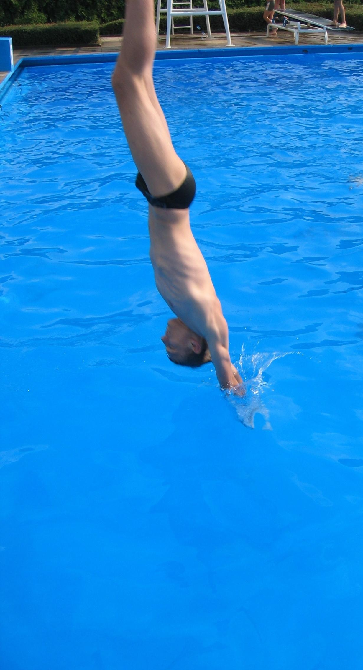 Ein Rettungsschwimmer beim Kopfsprung